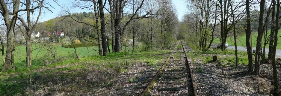 Mockethal: Blick auf die stillgelegte Eisenbahnstrecke Pirna - Herrenleite